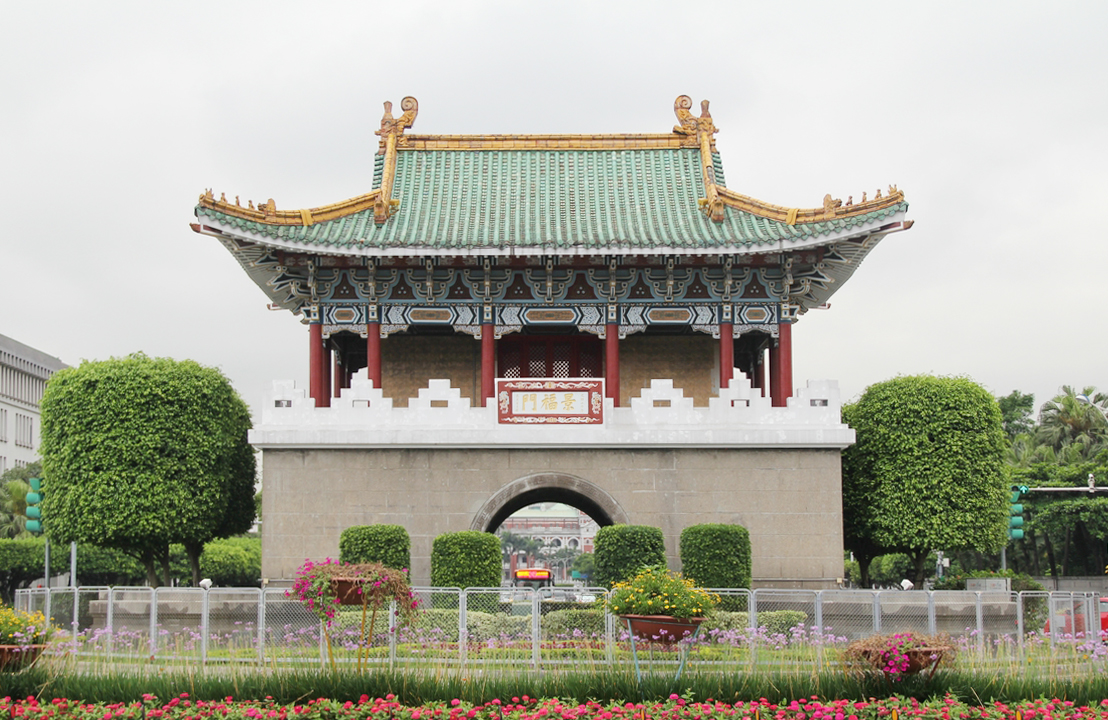 臺北府城東門。